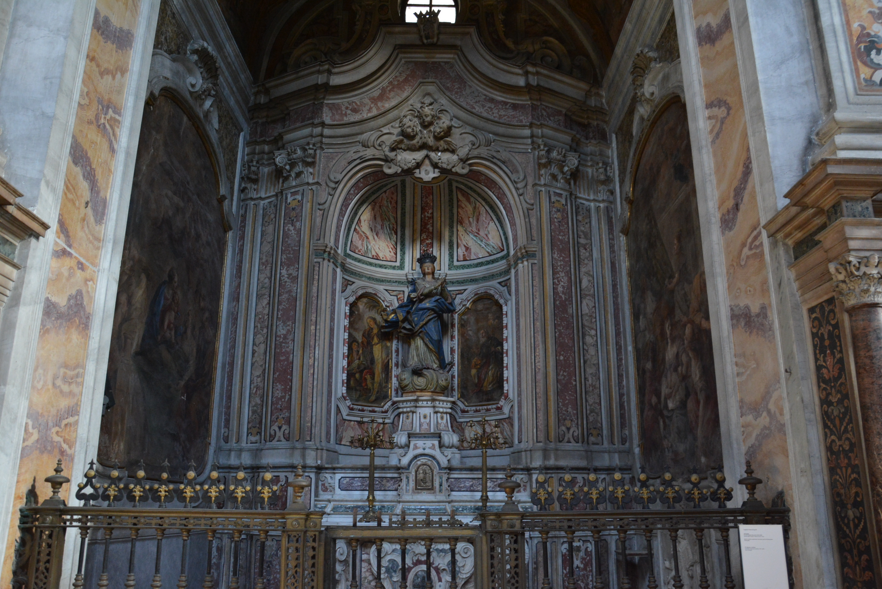 Cappella Veneta d'Aquino nella chiesa di Santa Maria la Nova a Napoli